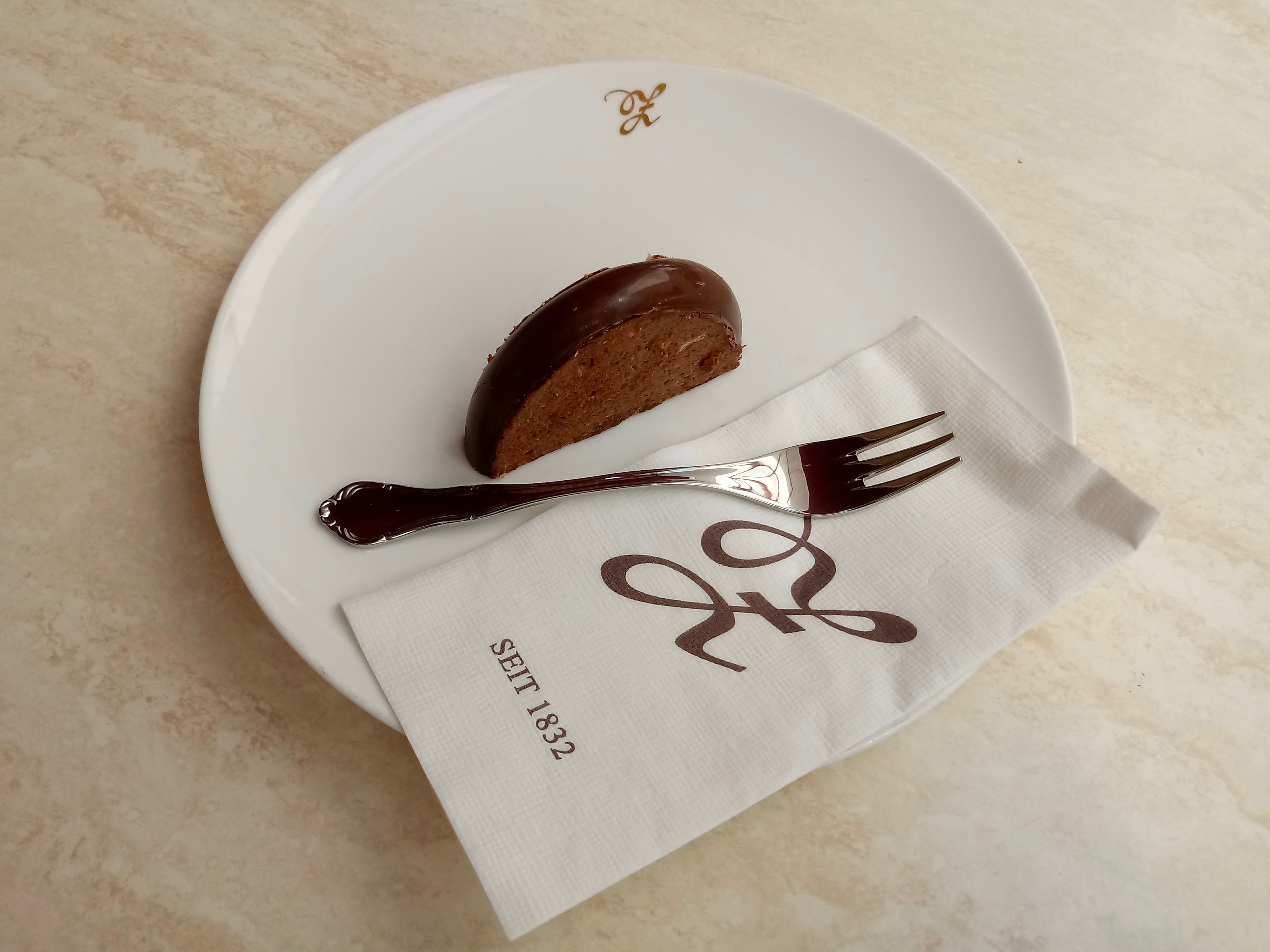 Zaunerstollen, serviert im Stammhaus der Konditorei Zauner in der Pfarrgasse in Bad Ischl.